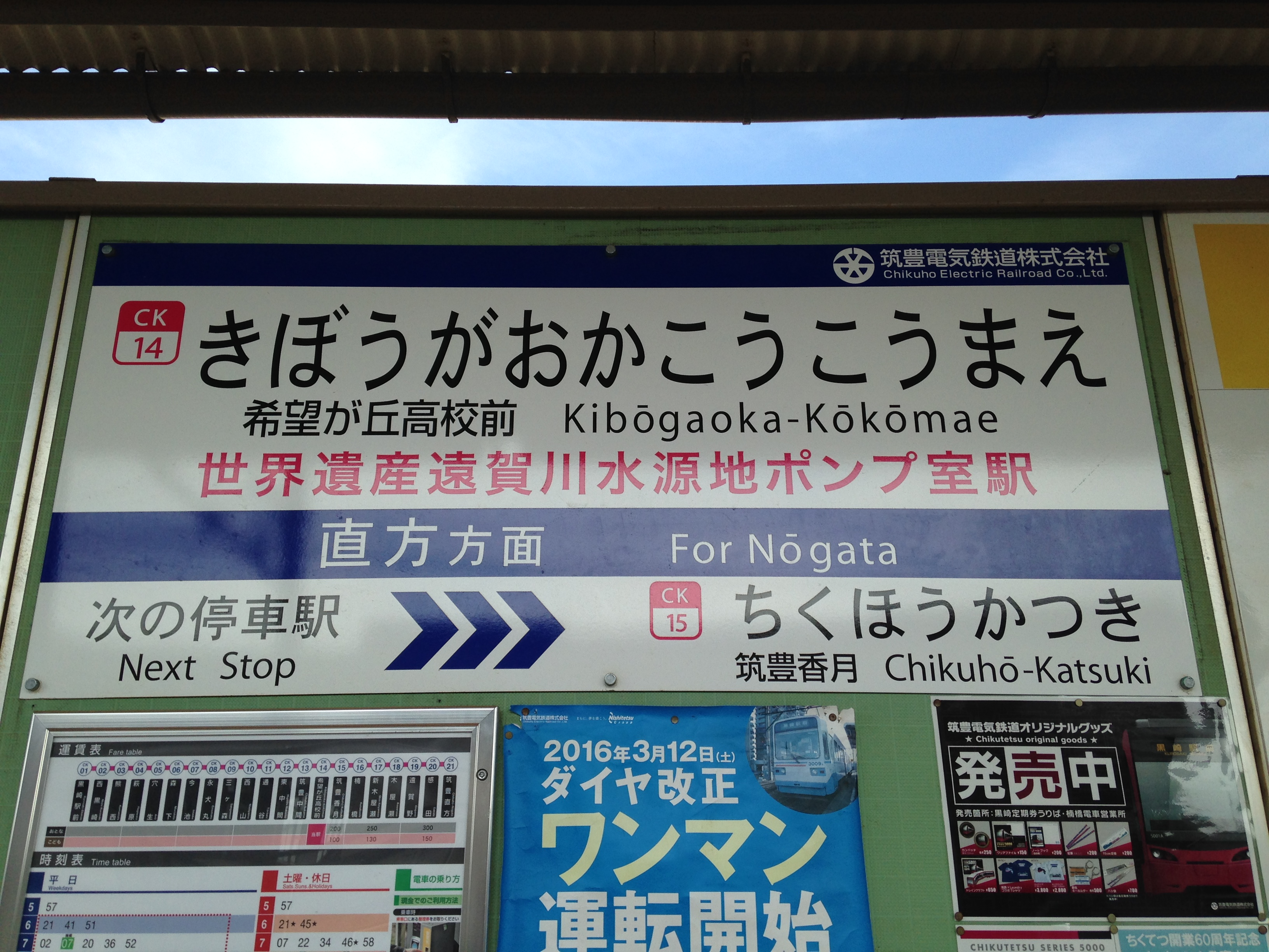 希望が丘高校前駅の駅名標